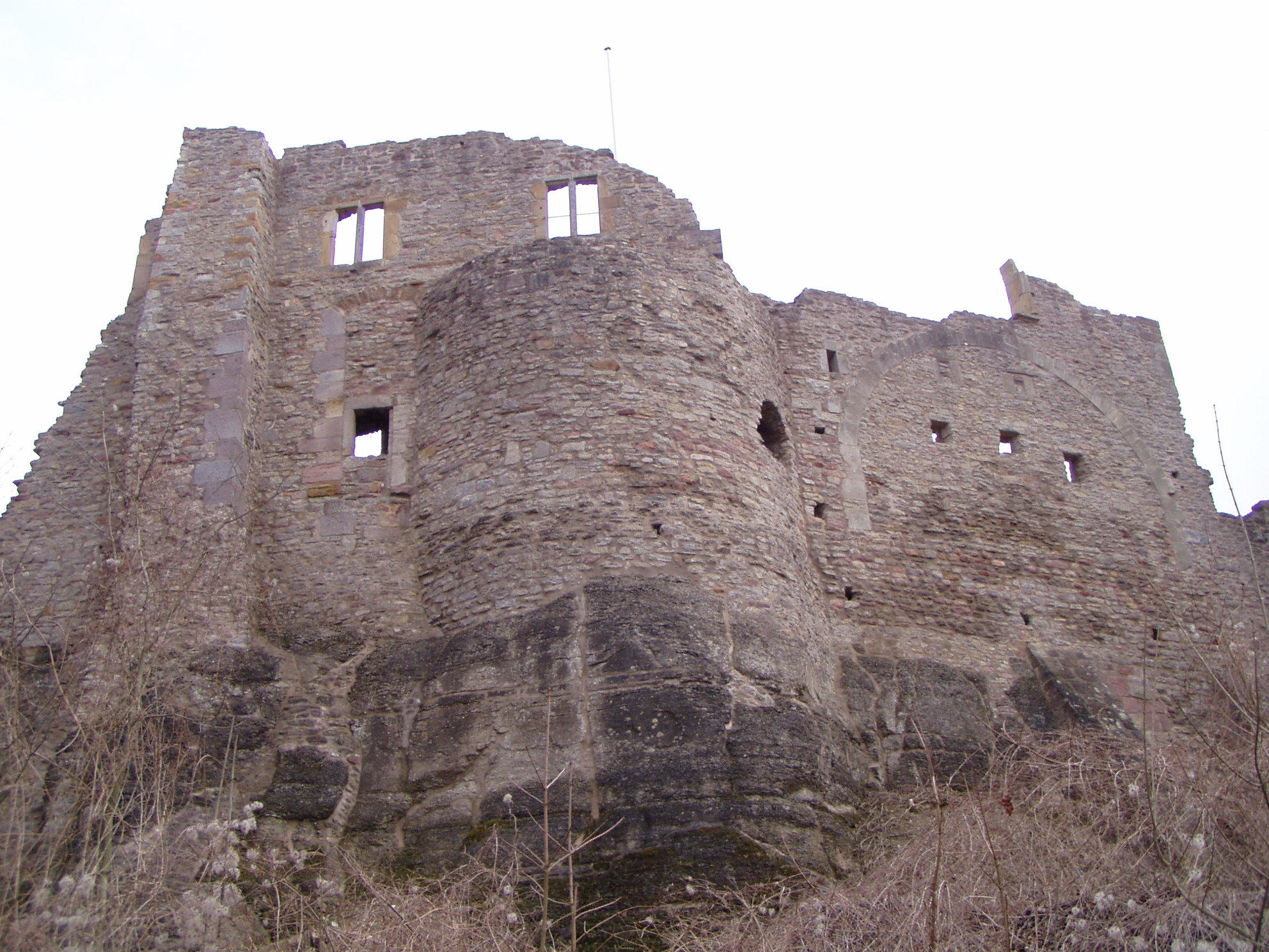 Blick von Westen auf den Palas des 13.-15. Jahrhunderts.